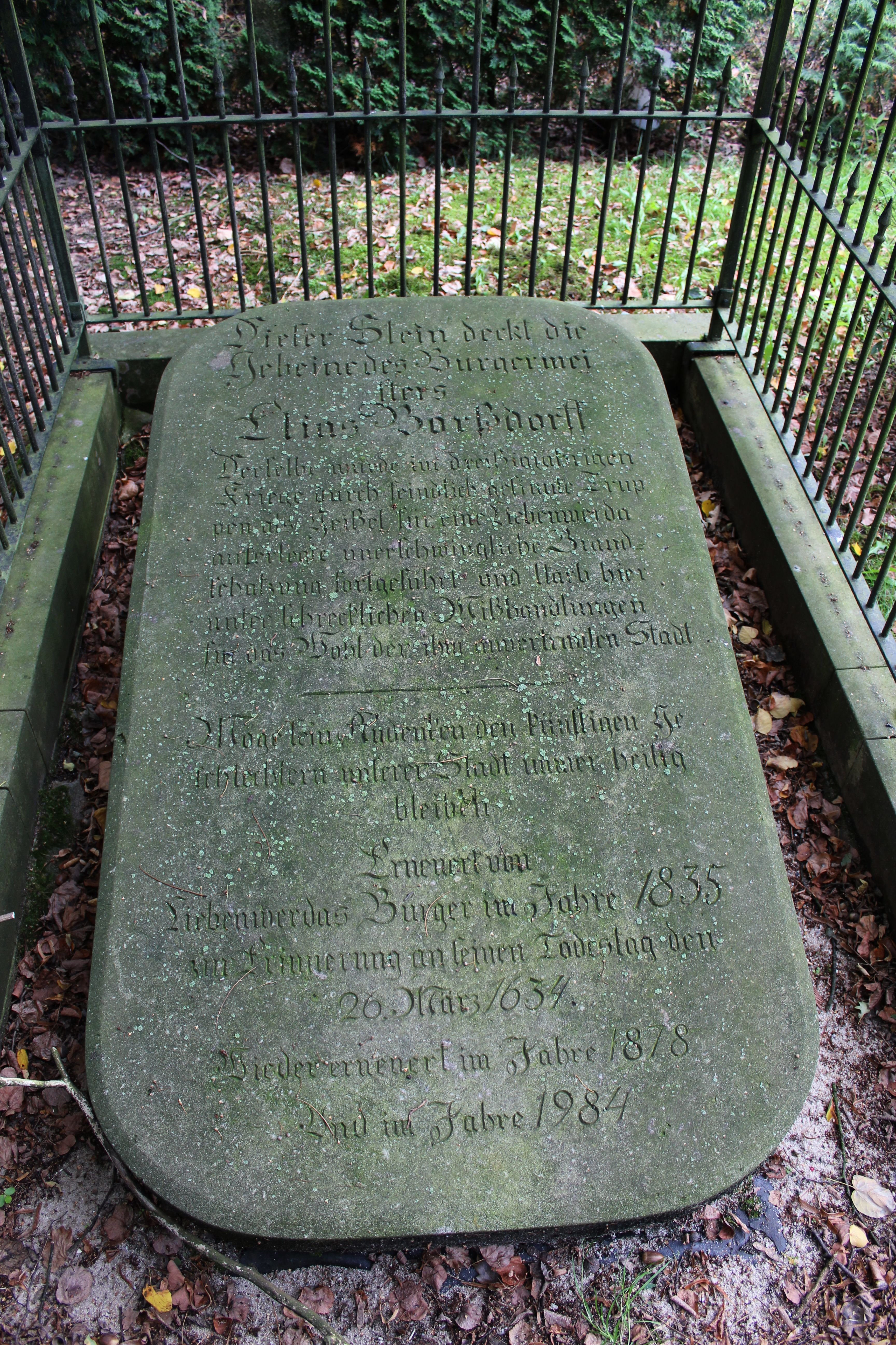 Das unter Denkmalschutz stehende Borßdorffgrab in Zeischa.